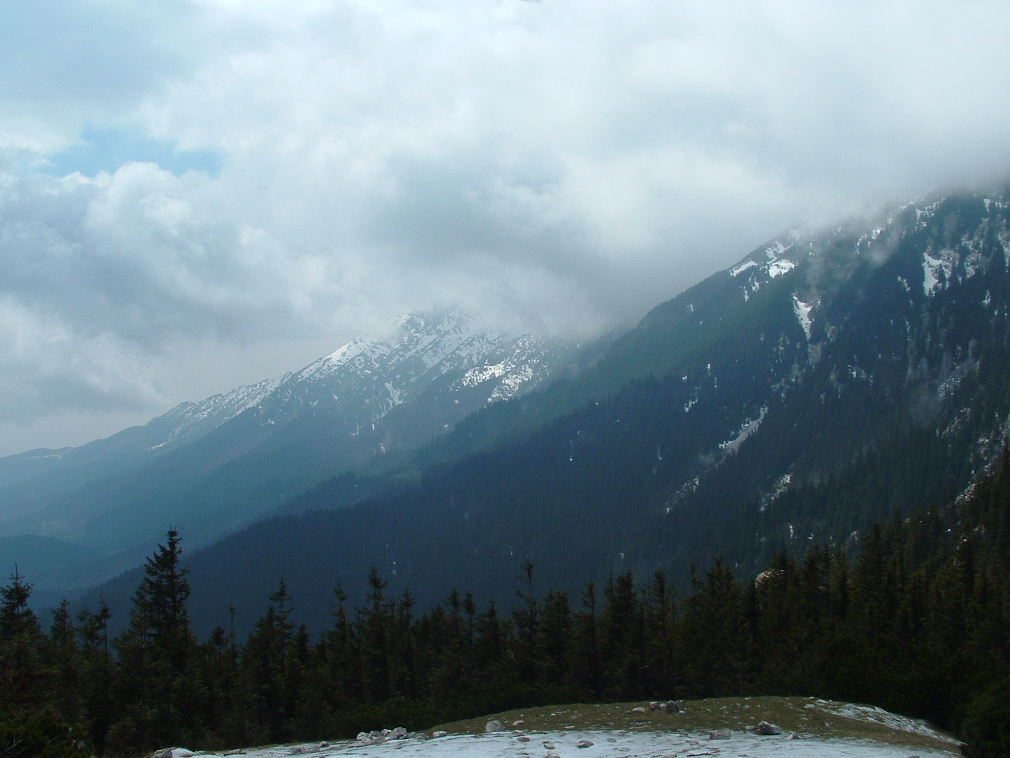 Hovudryggen til Piatra Craiului-fjella.